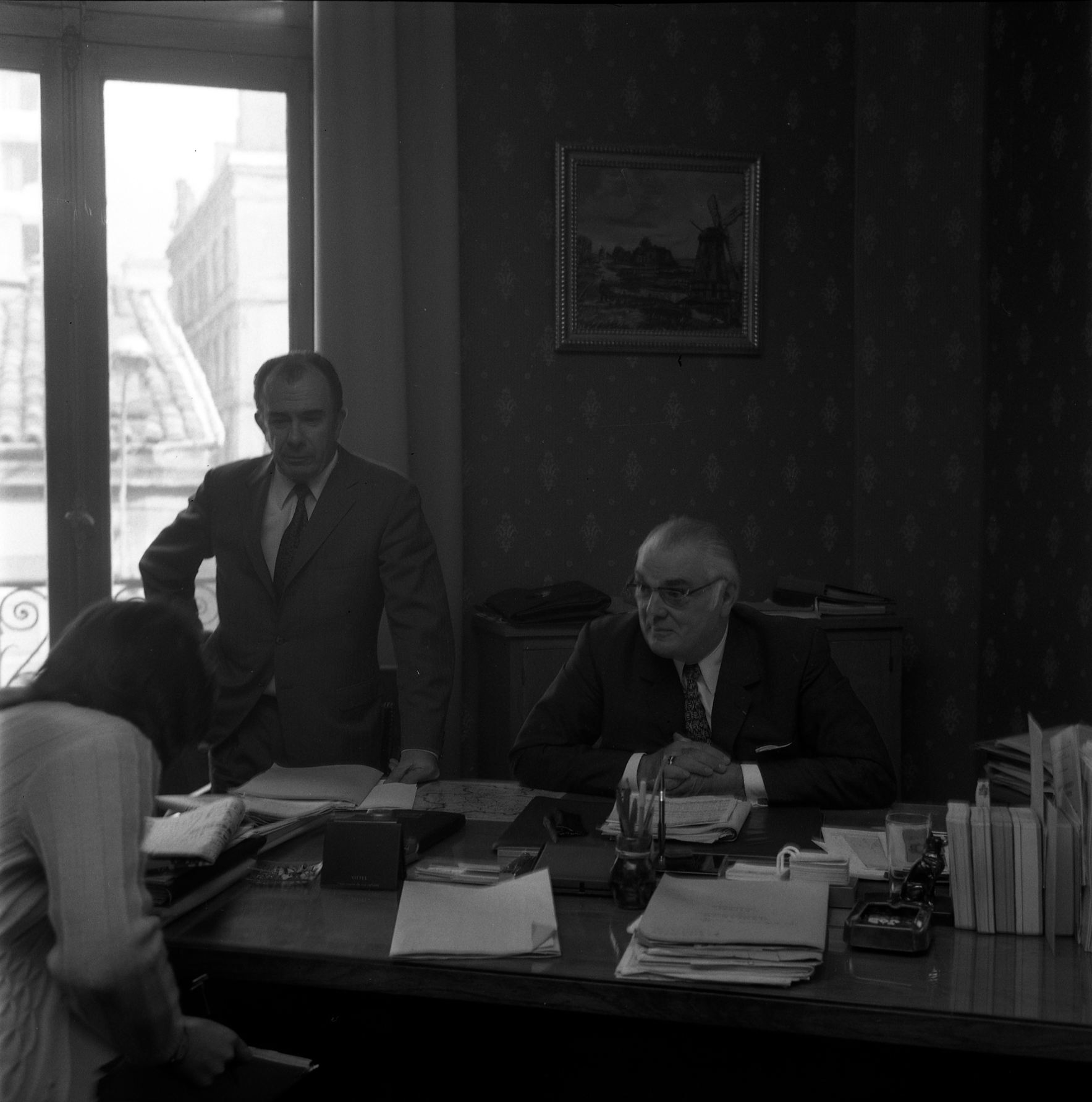 "+ M. Dalas chef du SRPJ" Locaux du Service Régional de la Police Judiciaire (SRPJ), Hôtel de Police, 17 rue du Rempart-Saint-Etienne. 4 octobre 1972. Vue d'ensemble de M. Dalas (commissaire divisionnaire, chef du SRPJ) derrière son bureau ; à côté de lui autre d'homme debout (M. Brémont chef adjoint du SRPJ?). Vue de face. Cliché pris le lendemain de l'arrestation des deux suspects Joseph Keller et Marcellin Horneich dans l'affaire du double meurtre d'Ondes. Observation: Dans la nuit du 29 au 30 août 1972, un couple de touristes anglais autostoppeurs, est assassiné à Ondes (José Clive Latter 23 ans et Joy Joffe 20 ans). Un mois après, les auteurs du crime sont interpelés : ils s'agit de Marcellin Horneich et son neveu Joseph Keller. Ils avouent leur crime le 4 octobre 1972. Après 4 ans d'instruction, ils sont condamnés à mort le 25 juin 1976 par la Cour d'Assises de la Haute-Garonne. Le 8 janvier 1977, ils sont tous les deux graciés par le Président Valéry Giscard d'Estaing.